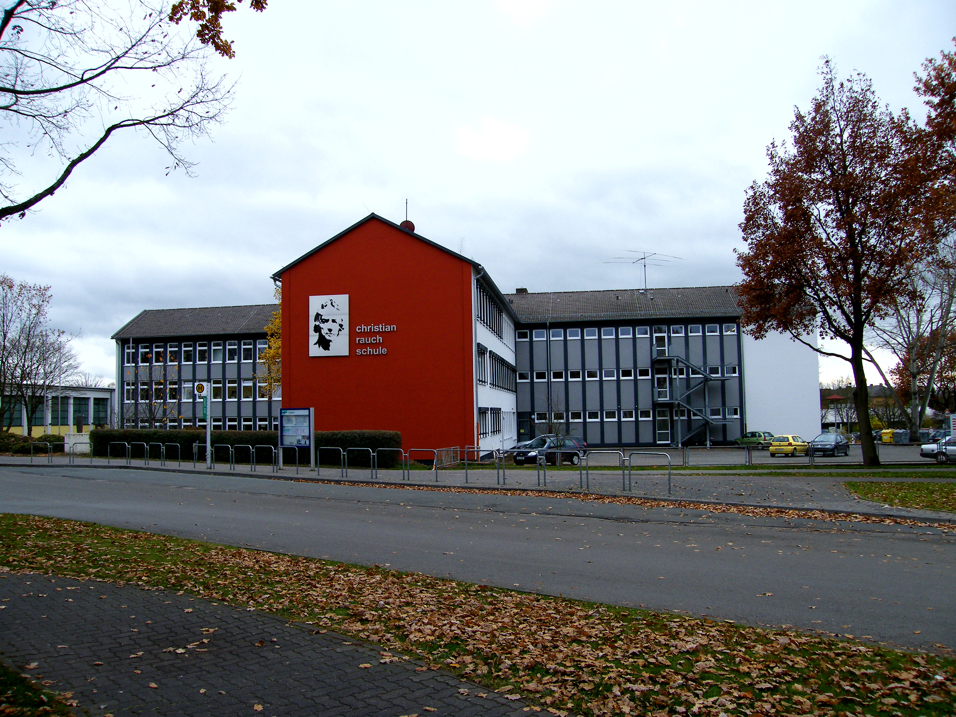 Gymnasisum - Christian-Rauch-Schule Bad Arolsen benannt nach Christian Daniel Rauch